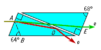 Схема действия призмы Николя. Красным обозначен обыкновенный луч (горизонтальная поляризация), зелёным — необыкновенный (вертикальная поляризация)